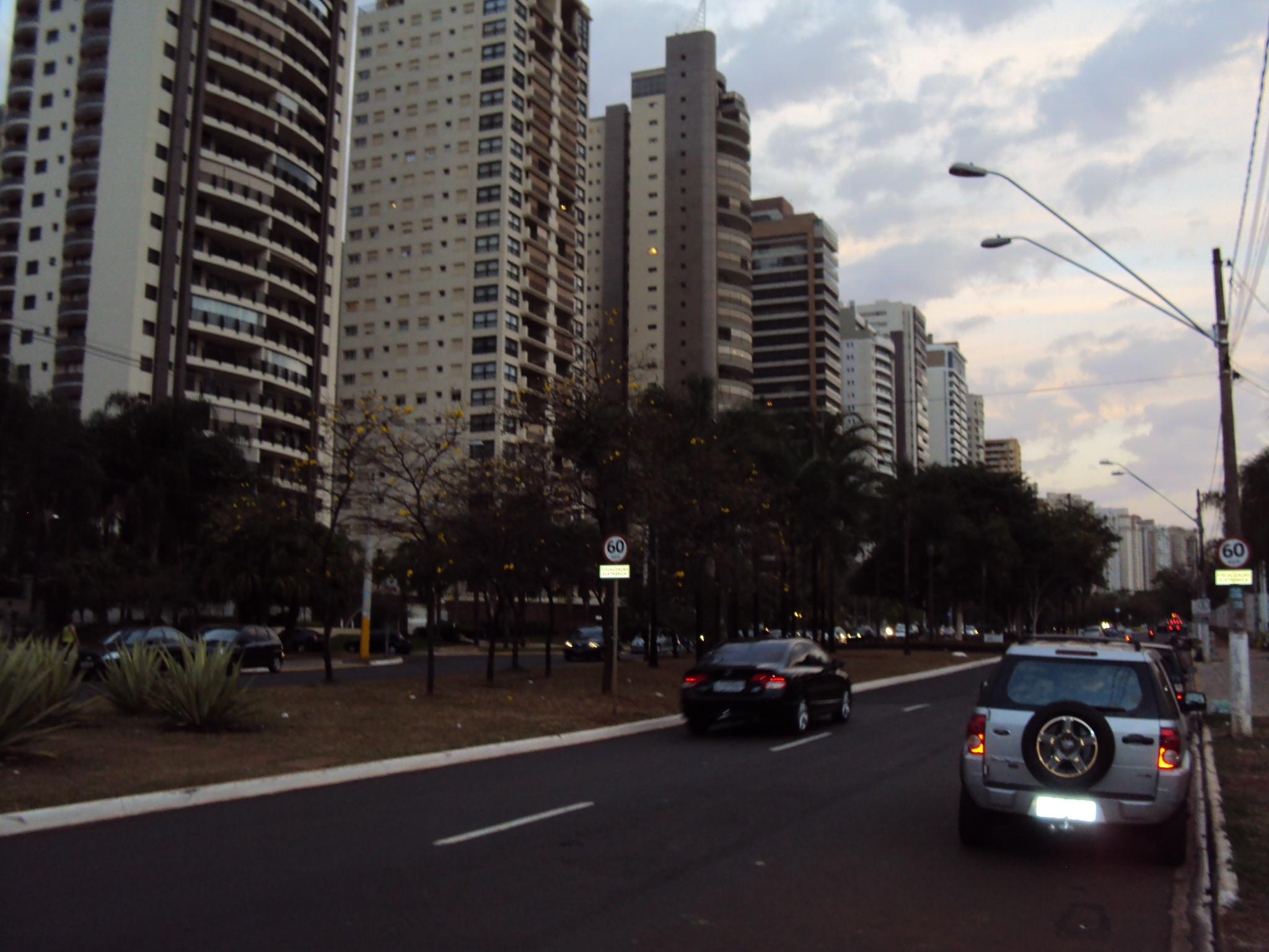 Avenida Professor João Fiúsa (Zona Sul)